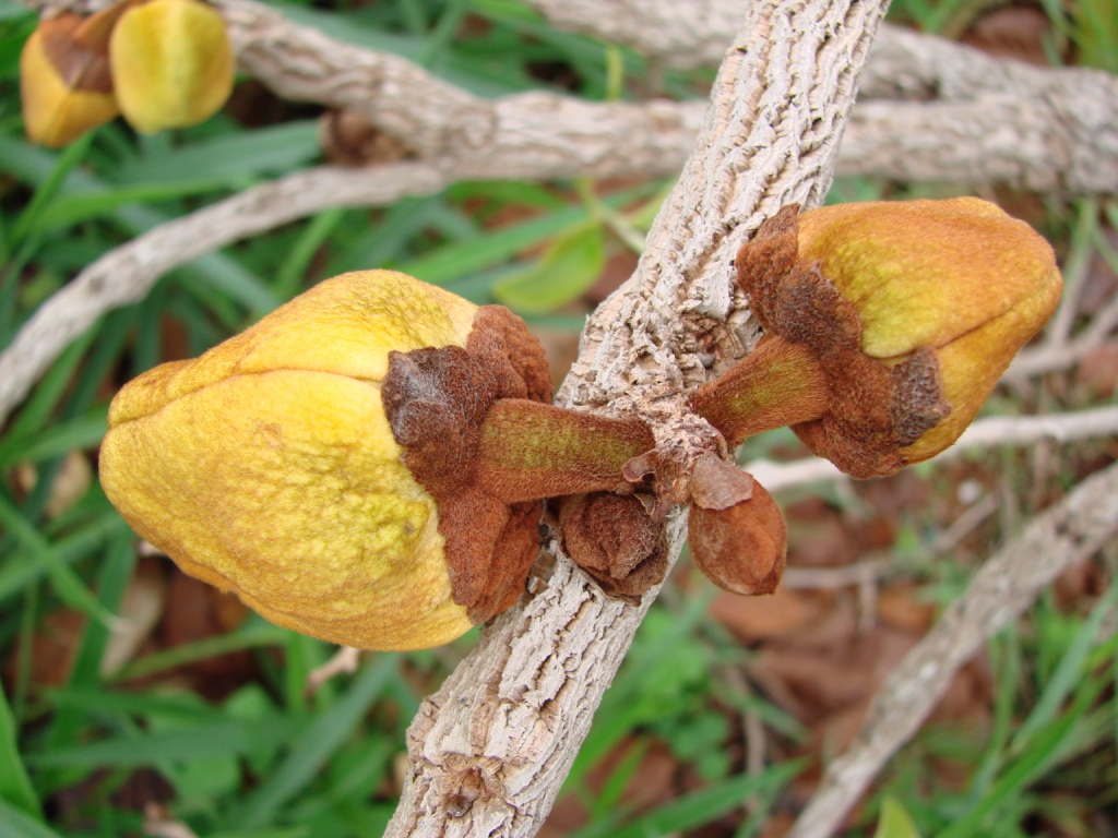 Annona crassiflora - ANNONACEAE Brasília - Distrito Federal - Brasil.